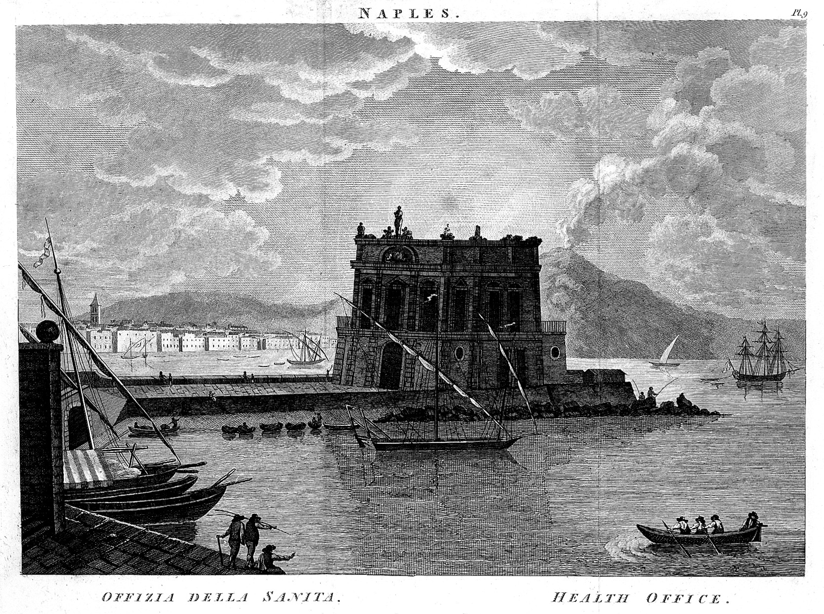 Naples: Offizia Della Sanita Rare Books Keywords: lazaretto; prison